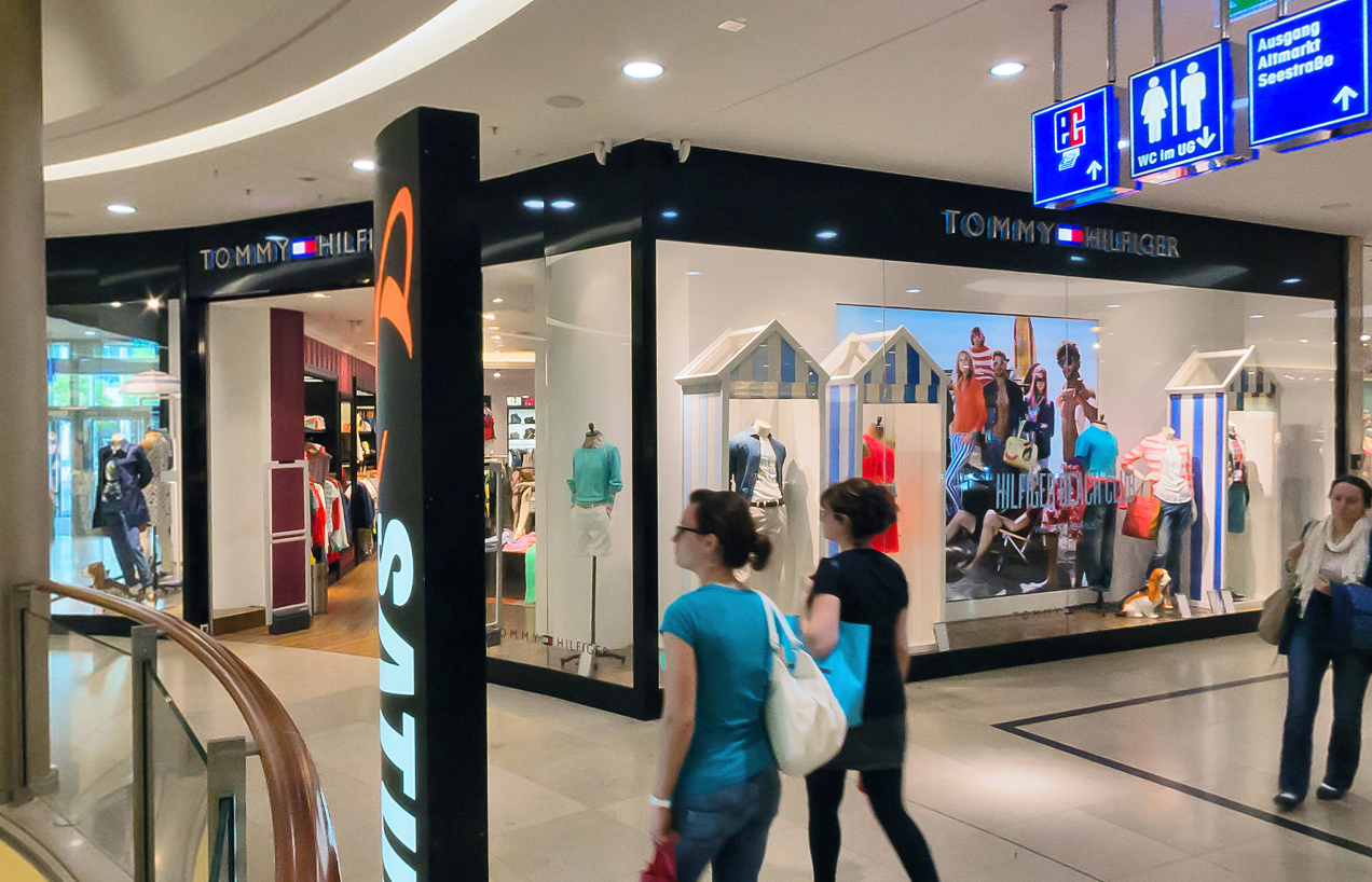 Boutique / Store in Dresden, Altmarkt-Galerie, Mai 2014